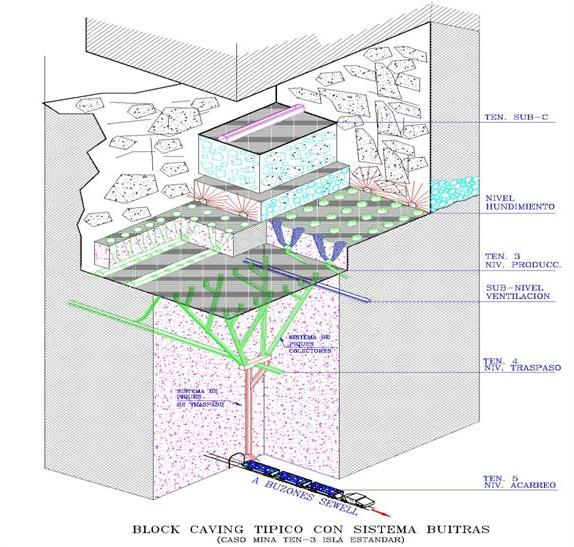 Esquema Metodo de Explotación Block Caving Tradicional